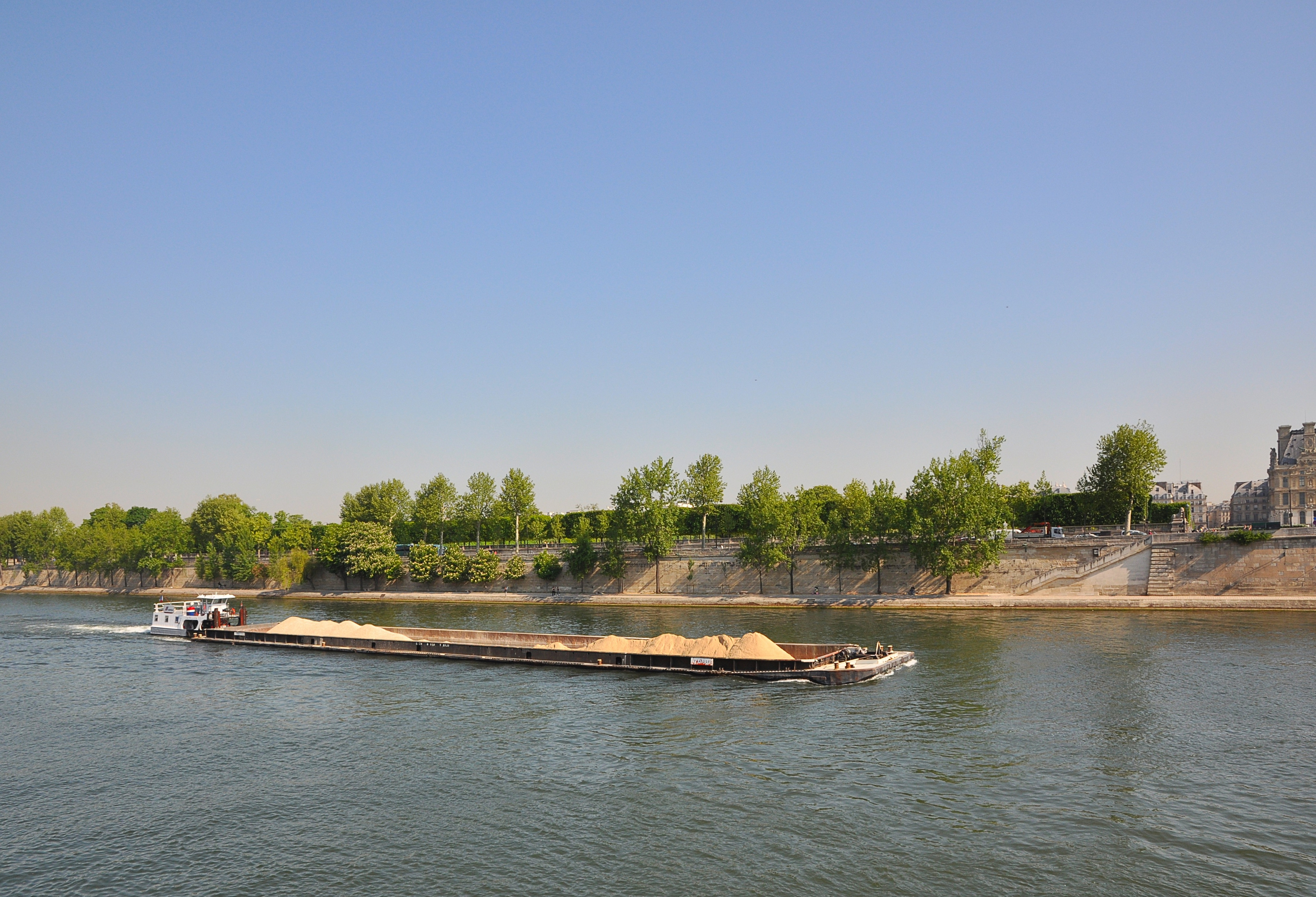 Transport de gravier sur la Seine à Paris.